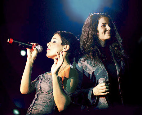 Юлия Волкова и Елена Катина. Выступление в «Гауди Арена».